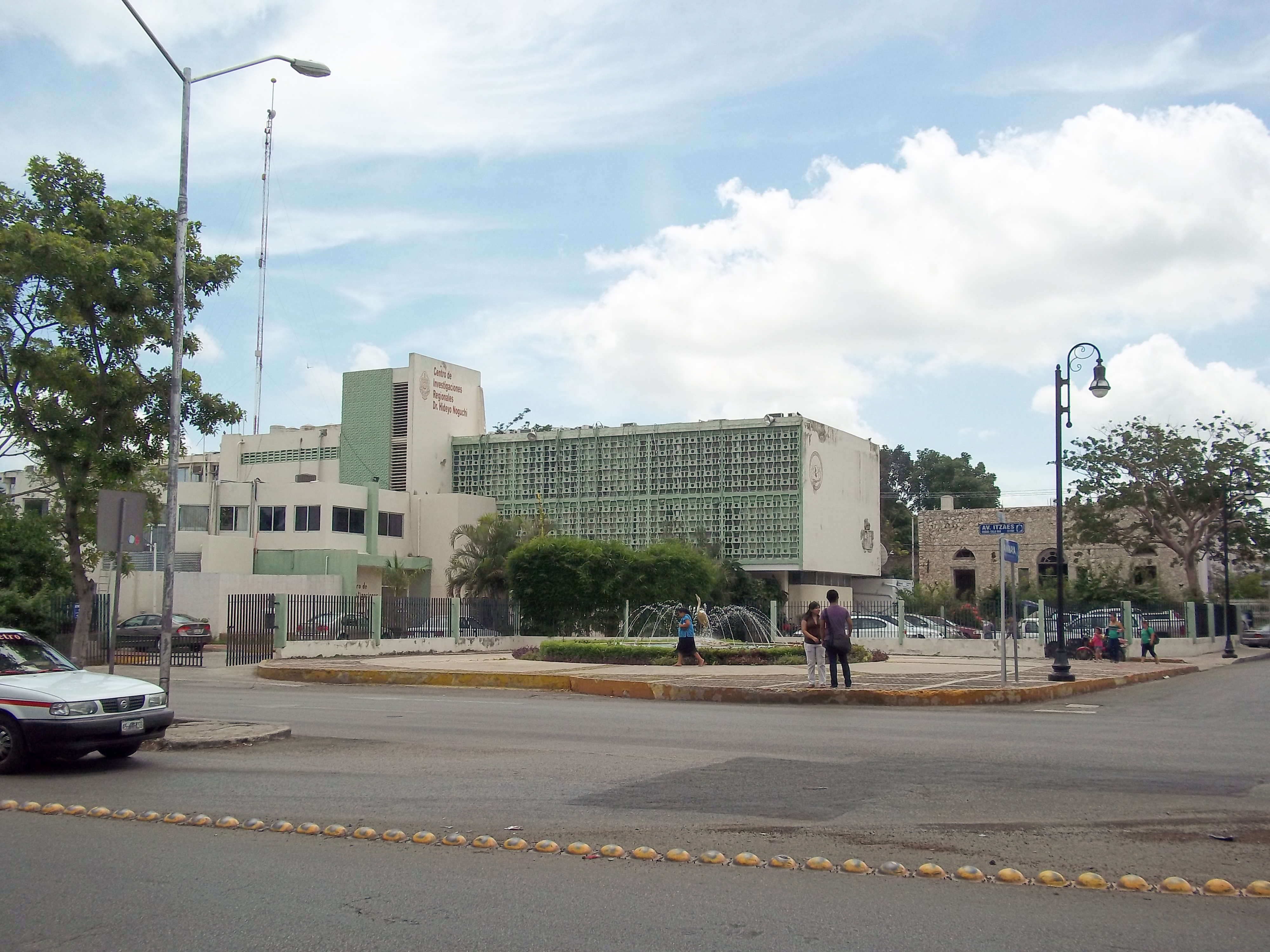 Centro de Investigaciones Regionales Dr. Hideyo Noguchi, Mérida, Yucatán.